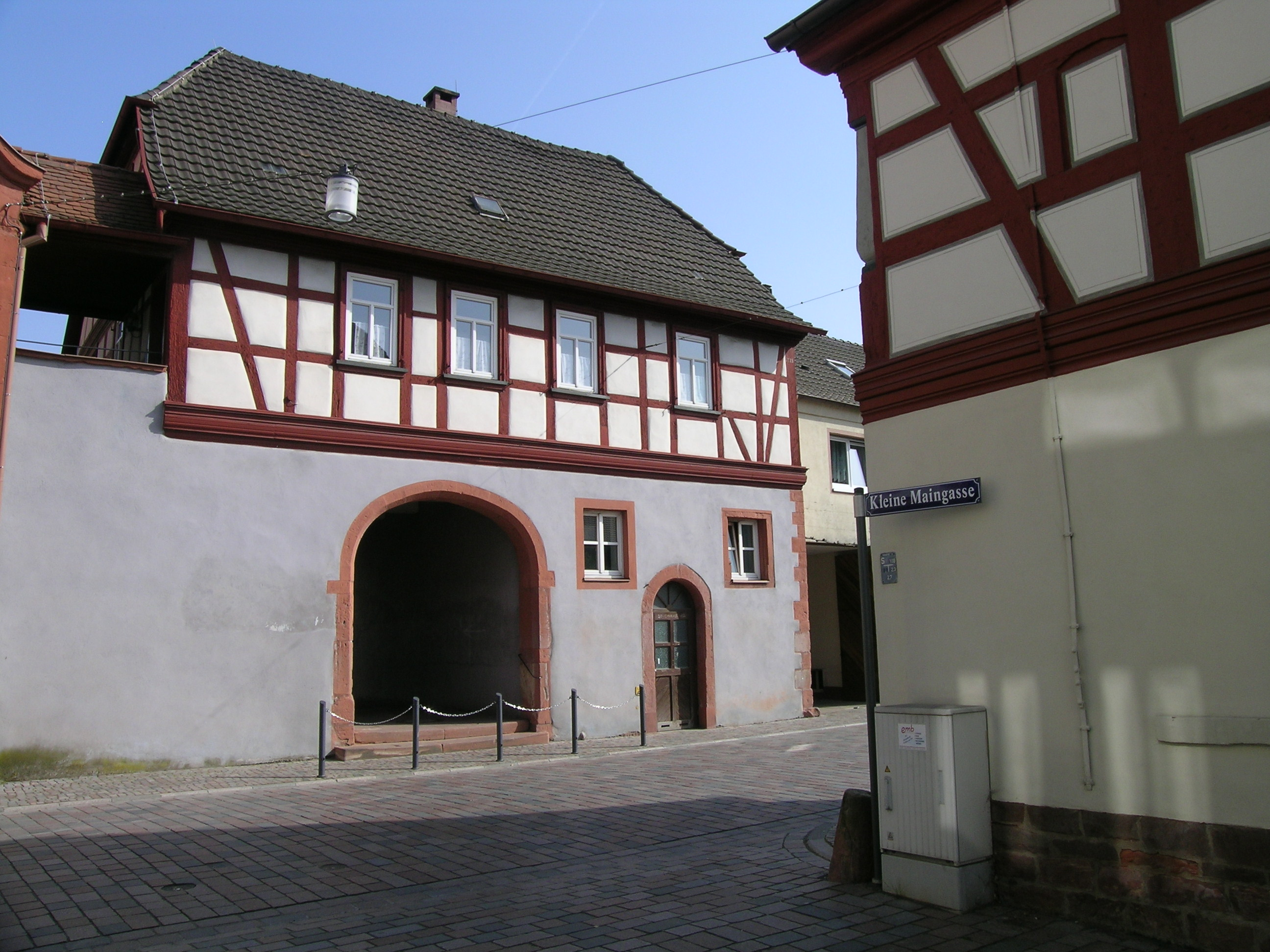 Fachwerkgebäude in Bürgstadt, Teil des Kirchhofs, Freudenberger Straße 20, Bürgstadt